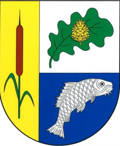 Strašov znak